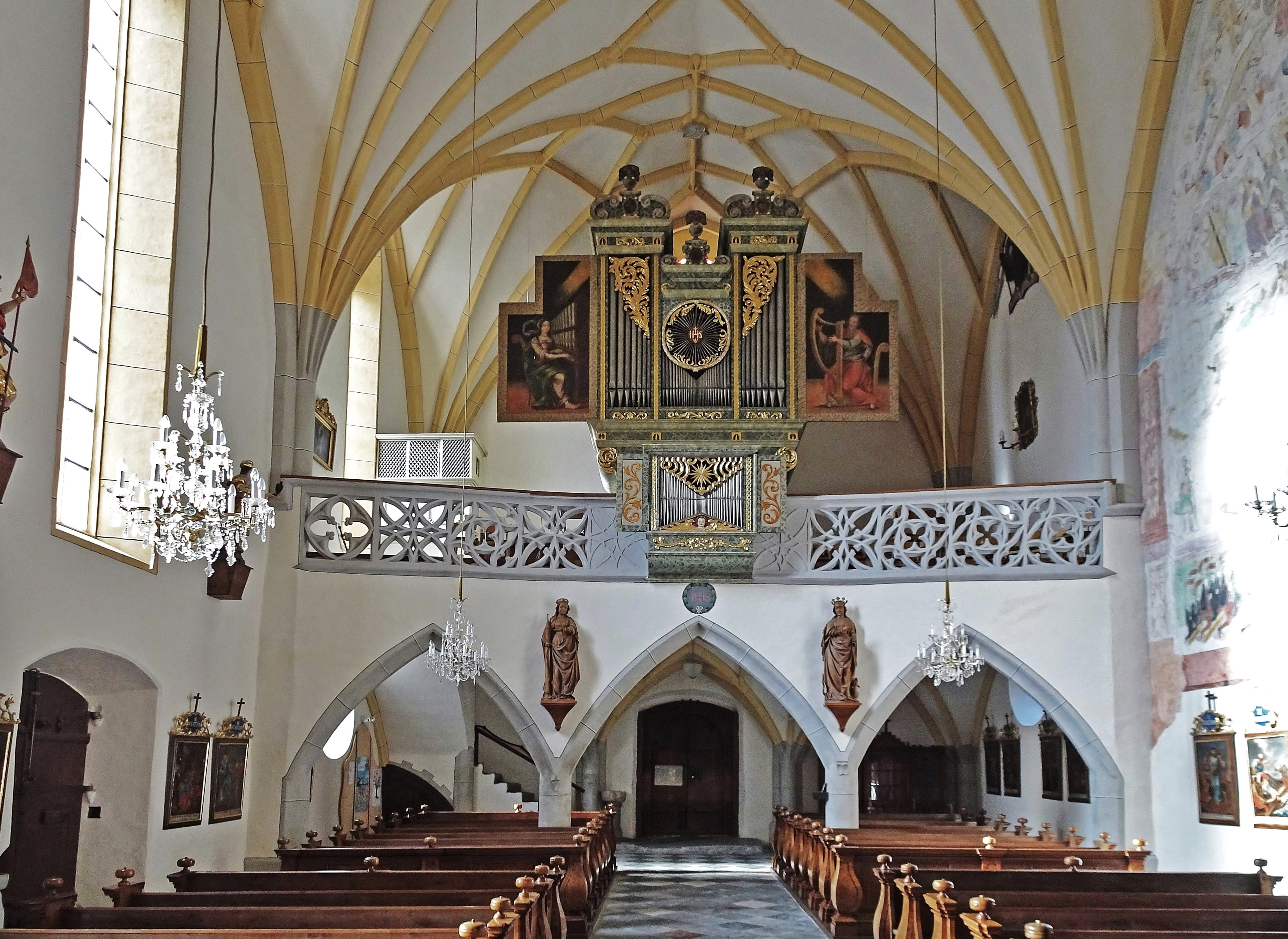 Kath. Pfarrkirche hl. Martin (Obervellach), die Orgelempore